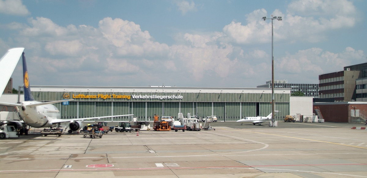 Bilder von Flughafen Bremen